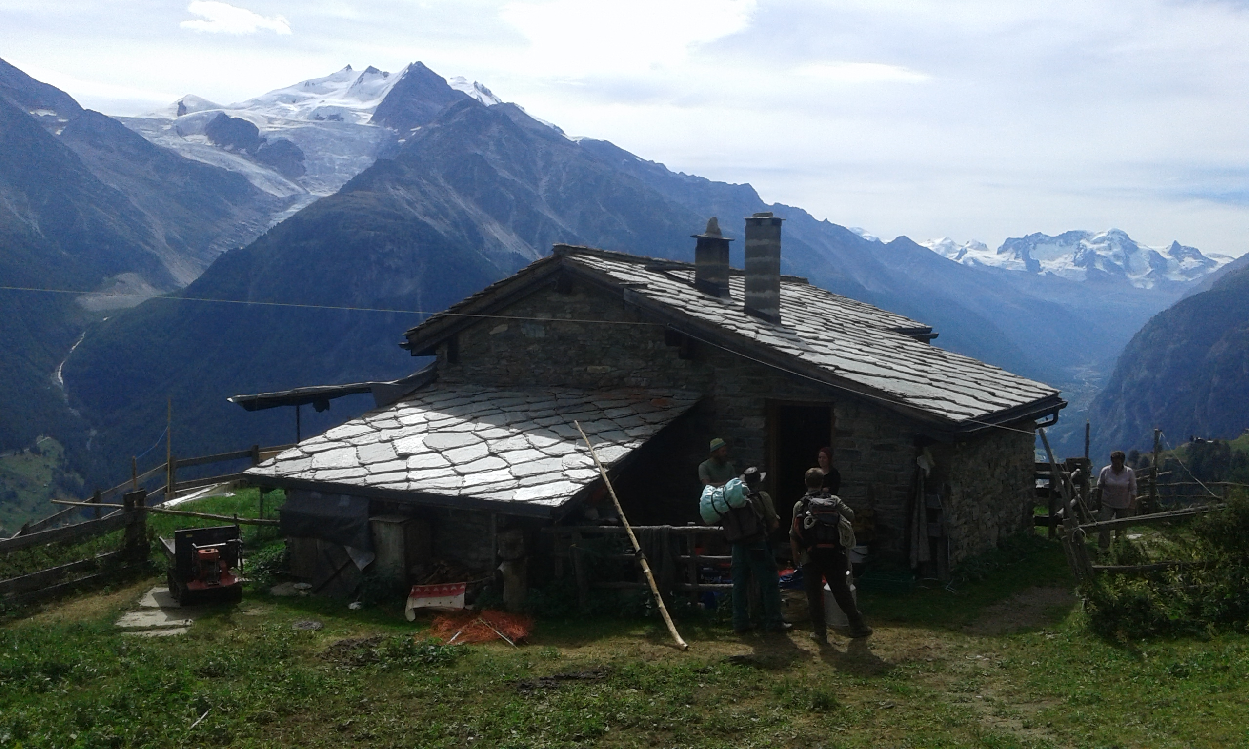 Die Sennhütte der Alp Jungen (Jungeralp) oberhalb St. Niklaus Dorf. Links Ulrichshorn, Riedgletscher mit Nadelgrat und Dom im Hintergrund. Rechts Castor, Pollux, Breithorn und Klein Matterhorn.